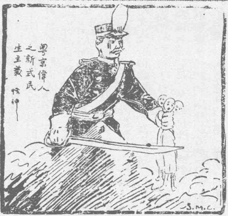 商团事变反孙漫画